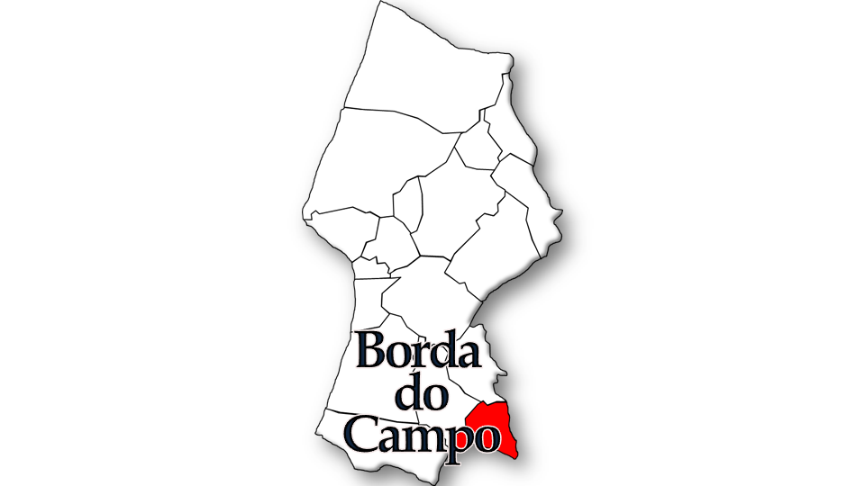 População